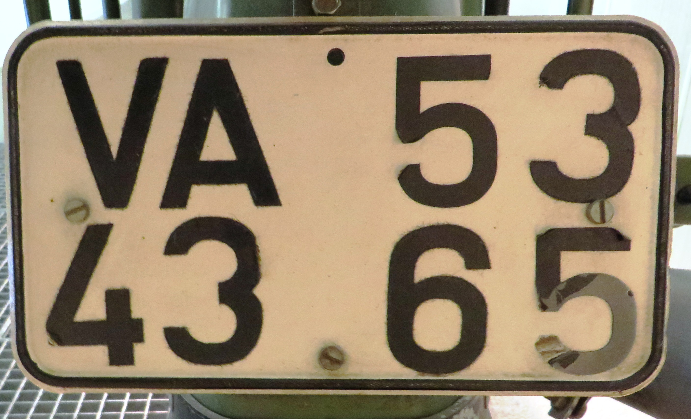 Kentekenplaat Nationale Volksarmee (DDR)